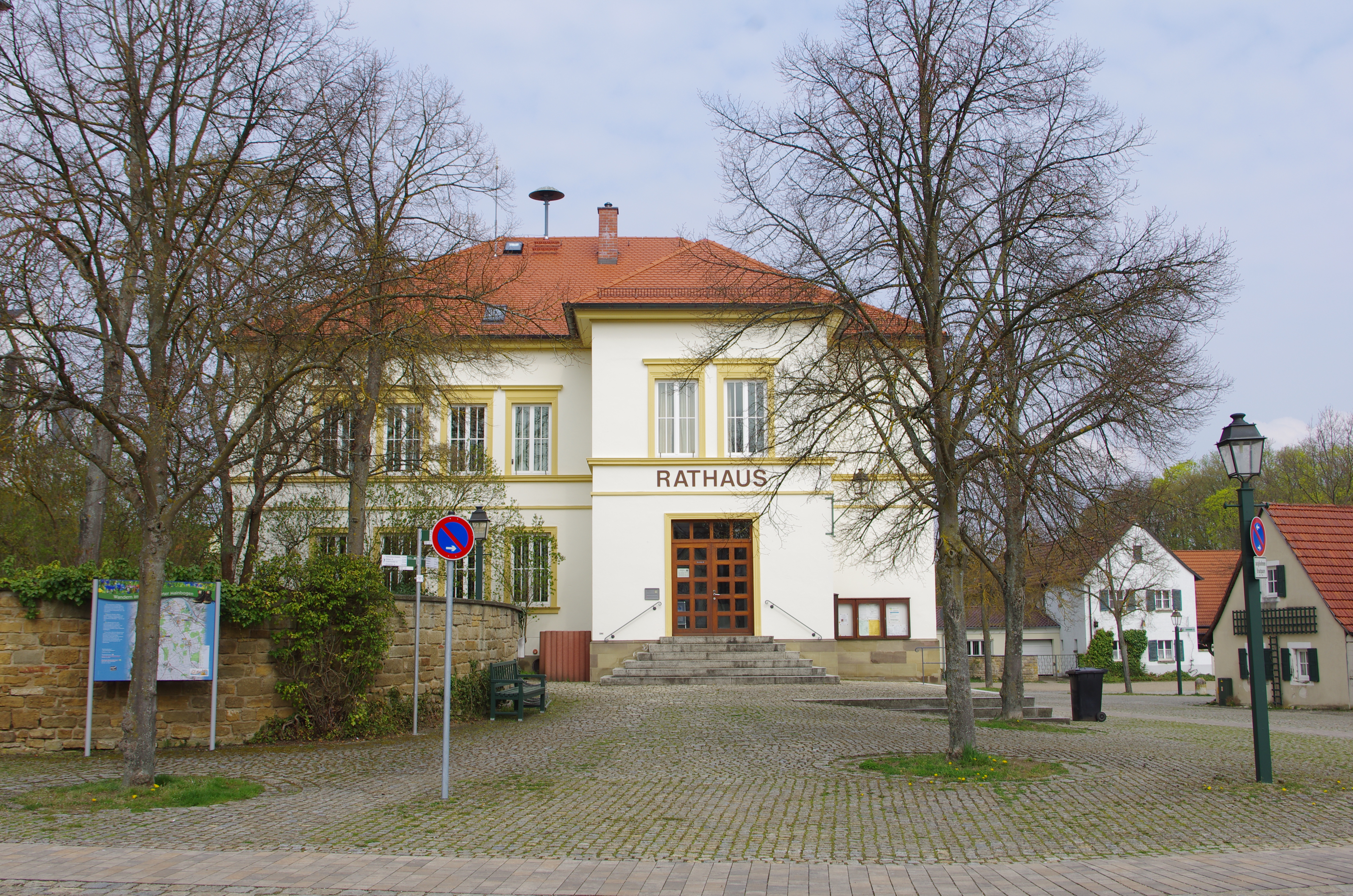 Rathaus, Kirchplatz, Schwebheim, Landkreis Schweinfurt, Unterfranken, Deutschland